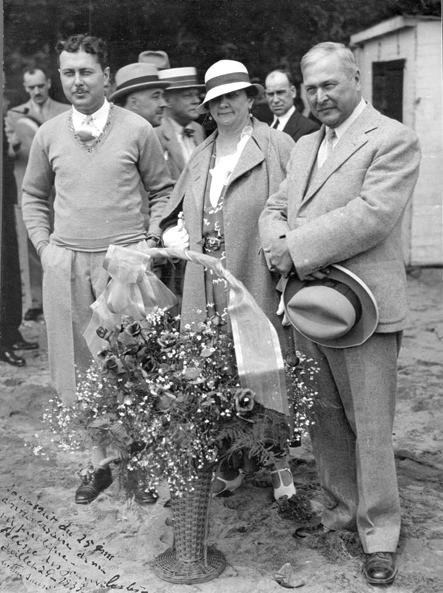 De gauche à droite : Paul Sauvé (député de Deux-Montagnes), Marie-Louise Lachaîne et Arthur Sauvé (député fédéral de Laval—Deux-Montagnes), lors d'une fête à l'occasion des 25 ans de vie politique d'Arthur Sauvé